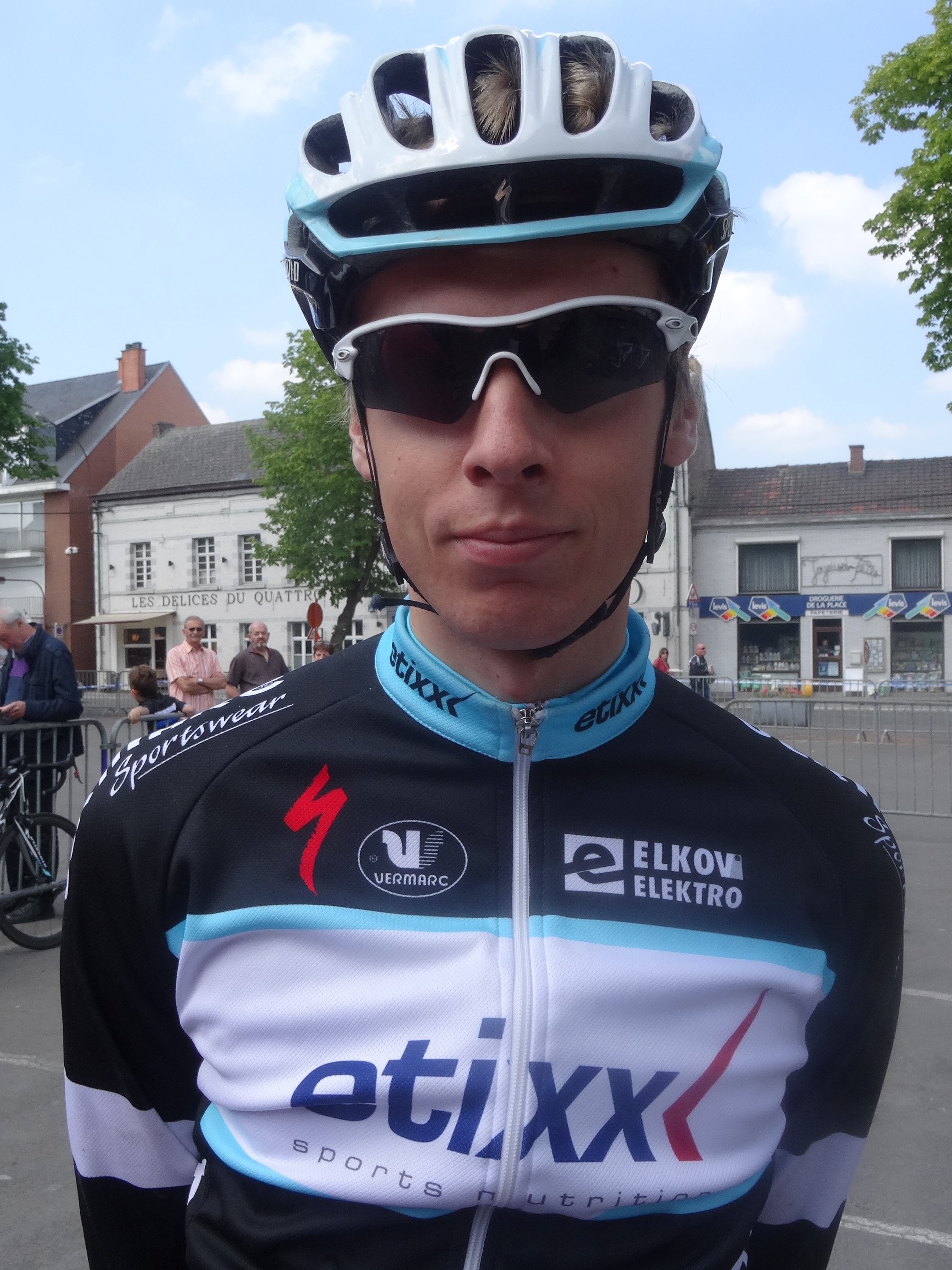 Reportage réalisé le samedi 17 mai à l'occasion du départ du Grand Prix Criquielion 2014 à Boussu, Belgique.